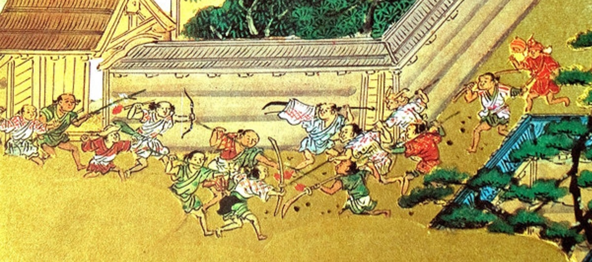 ｢端午の節句｣の行事で､菖蒲が尚武に通じる事から｢菖蒲合戦｣とも言われています｡